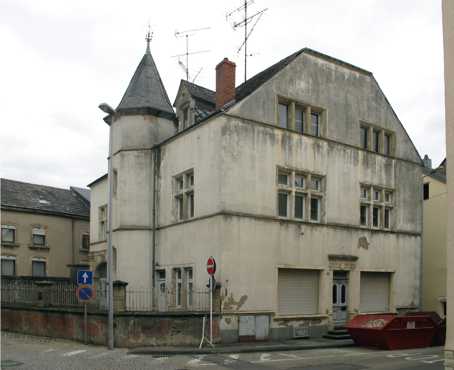 "Zéintscheier", Ecke rue de la Poste, rue de l'Eglise in Grevenmacher, Luxemburg